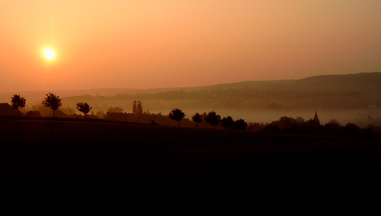 De Condroz, de vallei van Buzet, nabij Floreffe. Eigen opname.